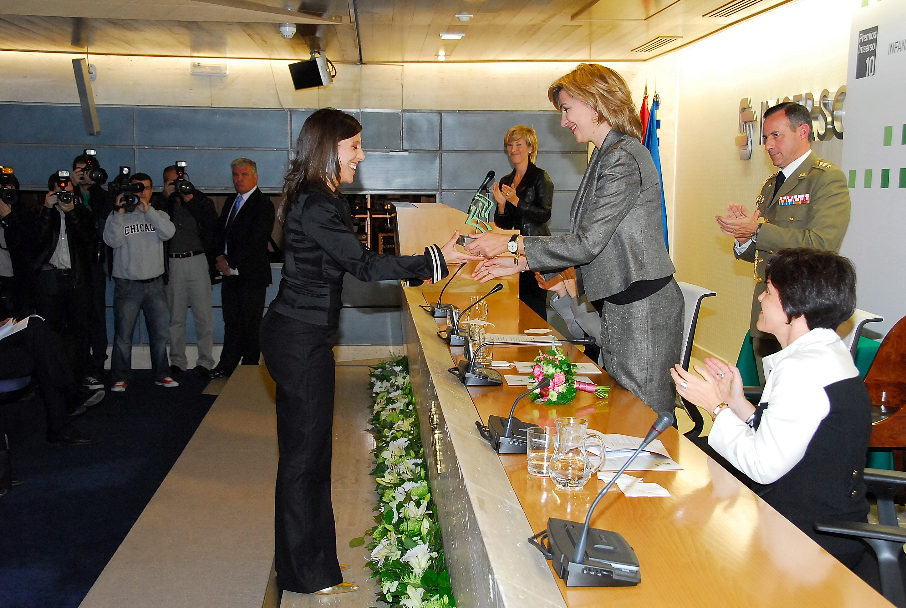 Laura Ponce de León, entusiasta hasta la extenuación y profesora de Trabajo Social de la UNED, ha recibido el premio de Investigación Infanta Cristina 2010, porque su trabajo ha permitido estudiar las claves para desarrollar un envejecimiento activo y exitoso en las que ejercitar la memoria y mejorar la disponibilidad de recursos sociales son dos piezas fundamentales. (iqv)